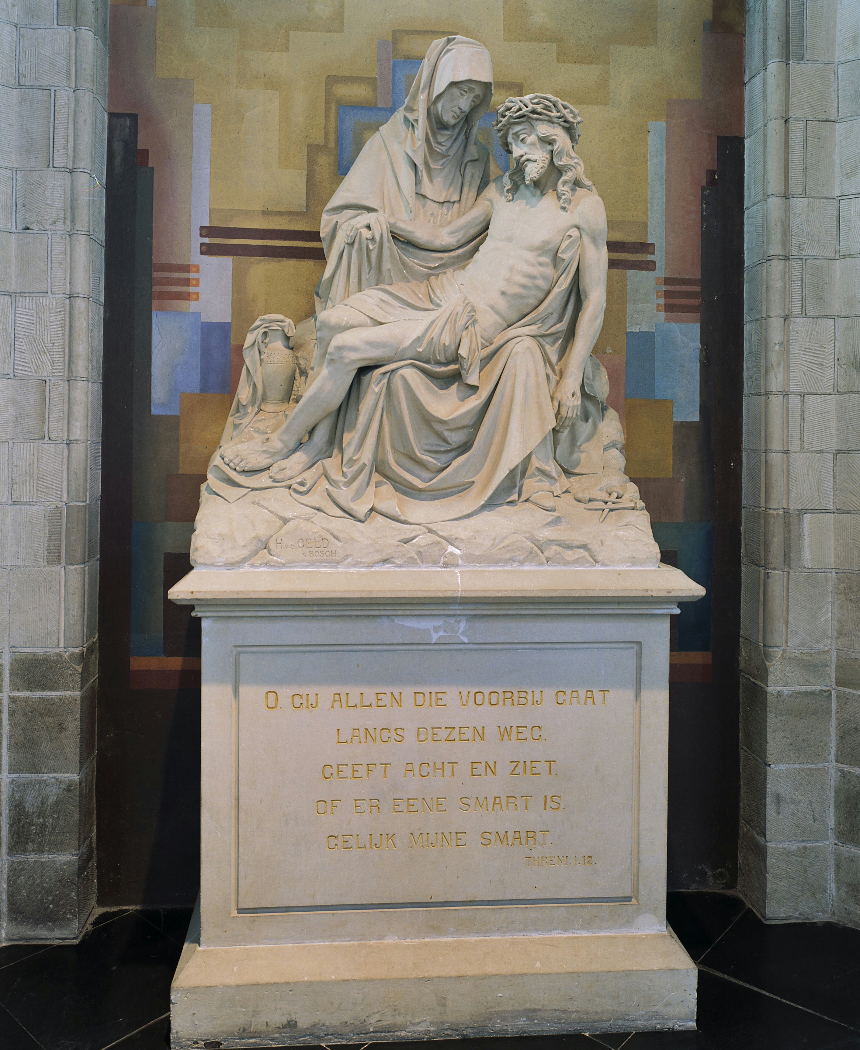 Sint Martinuskerk: Interieur, zuidzijde schip, pieta van H. van der Geld